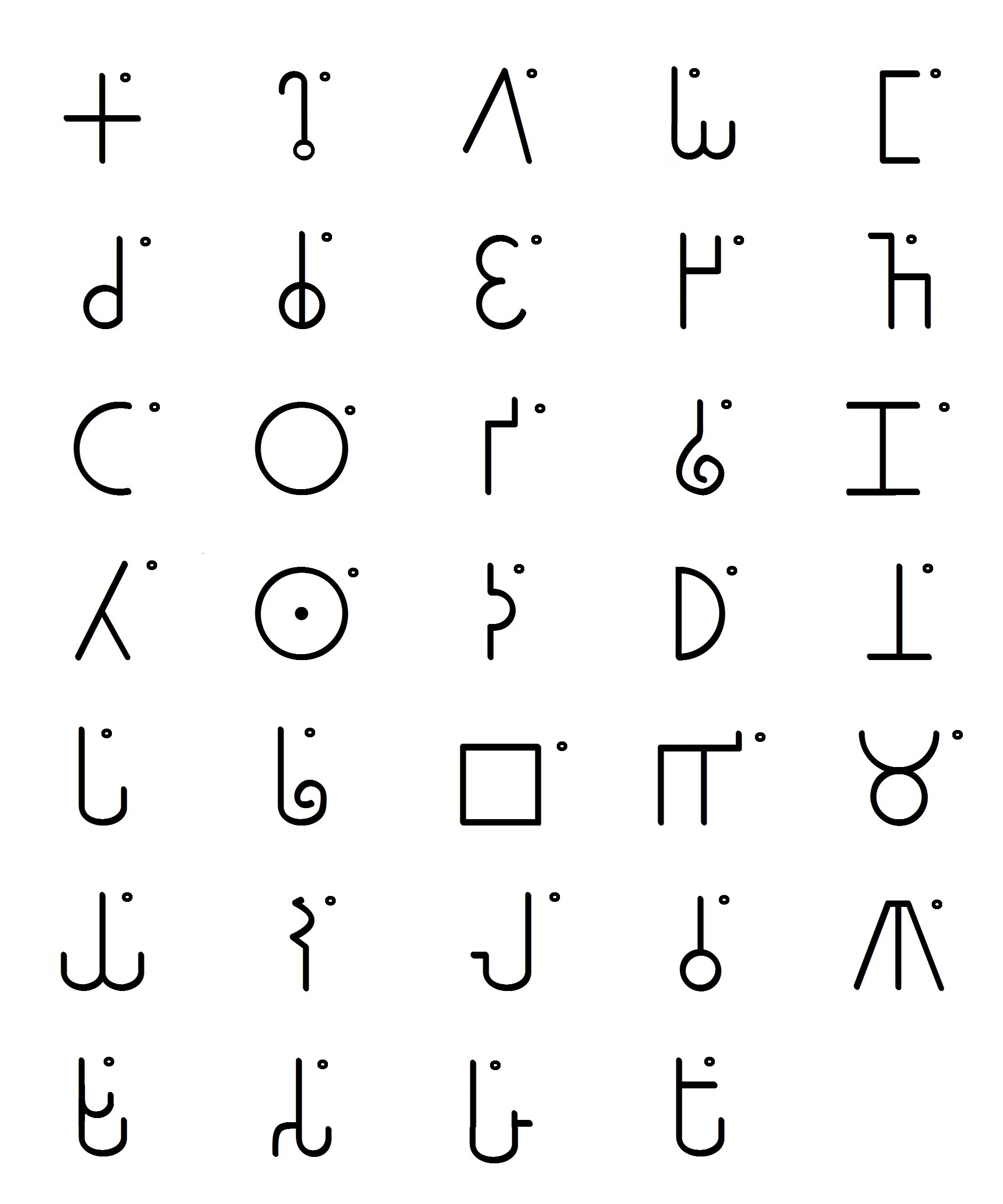 ब्राम्हि व्यंजने - अनुनासिकांकित (अनुस्वारांकित)